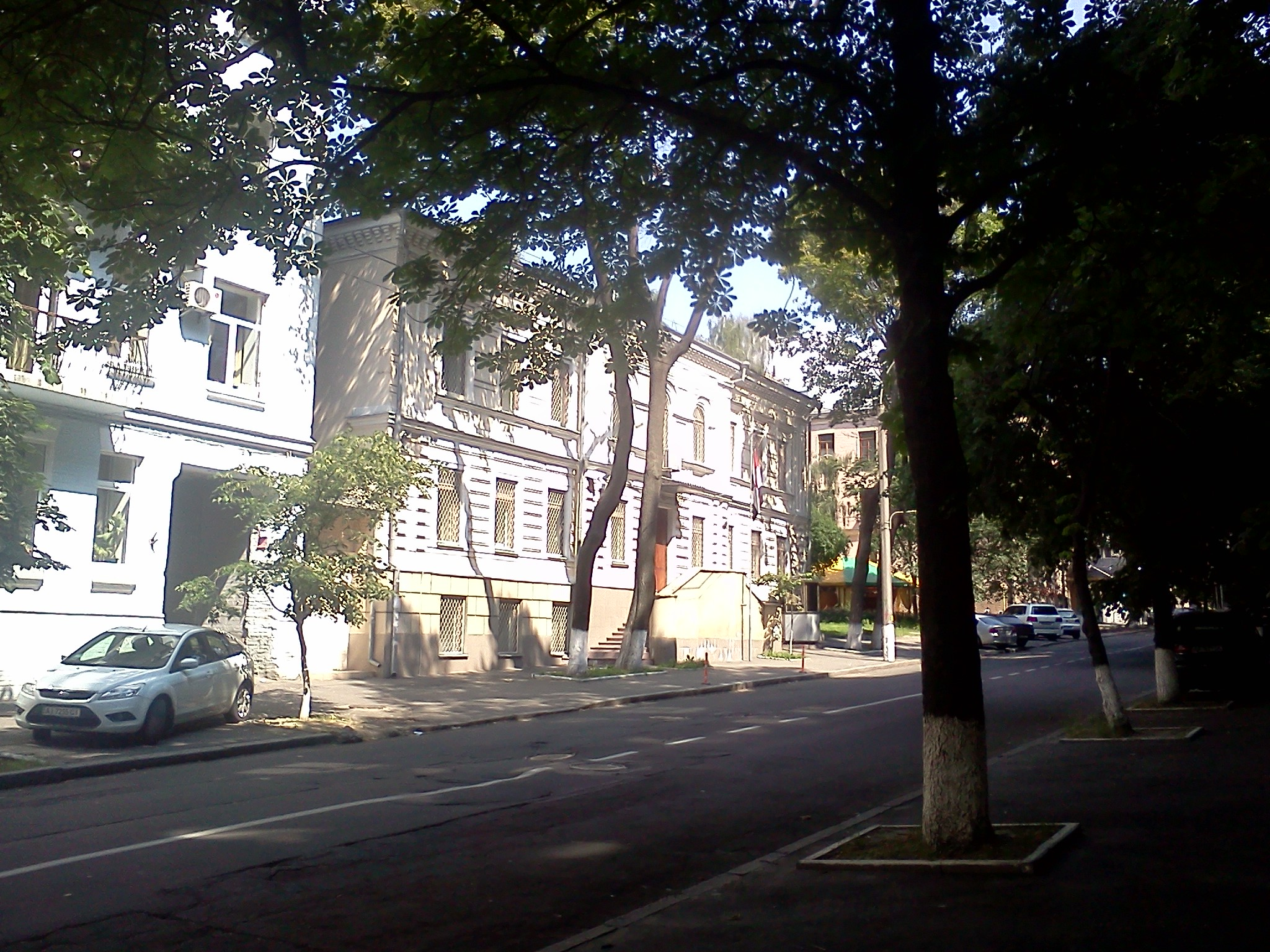 Посольство Єгипту в Києві